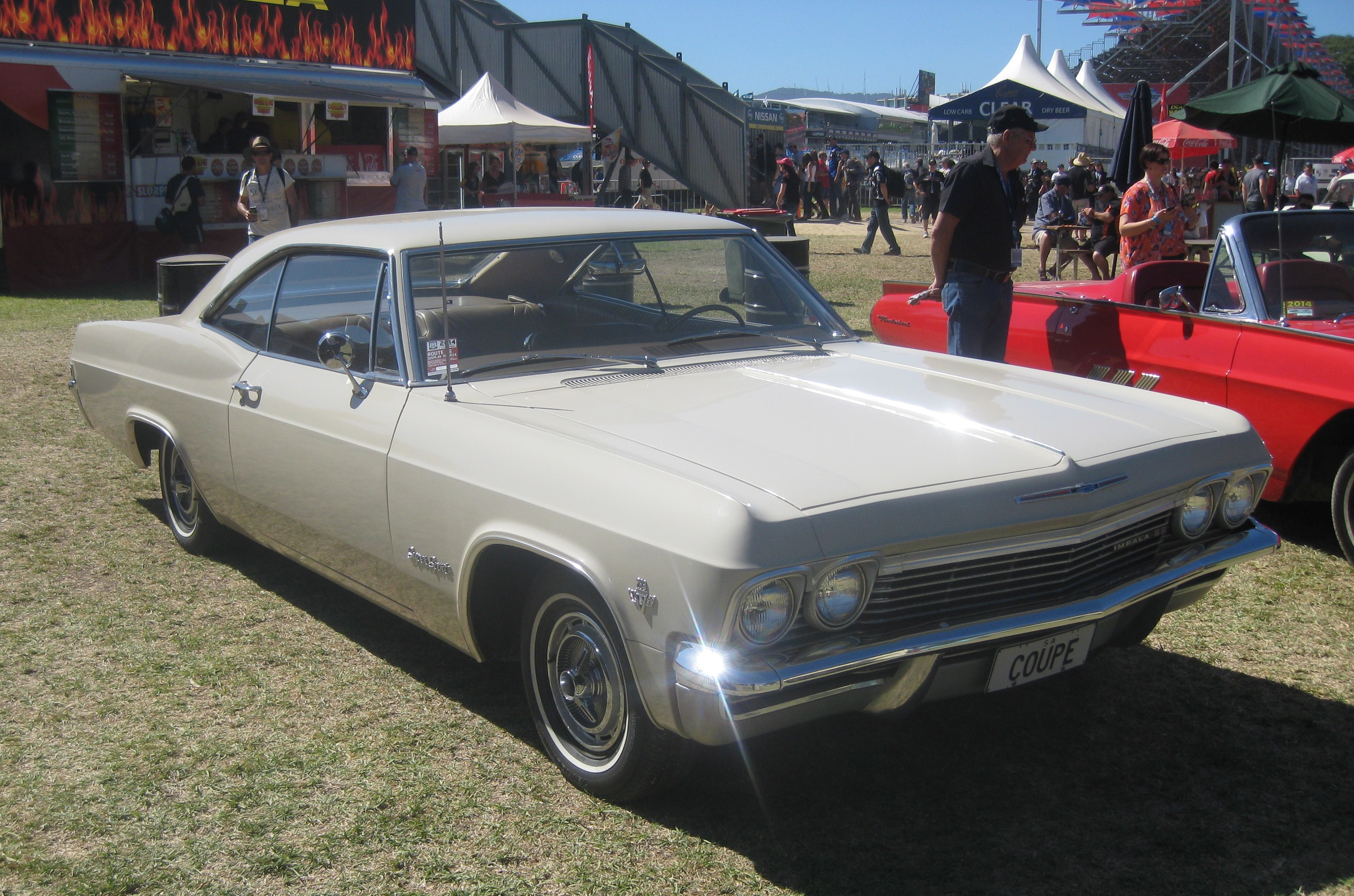 1965 Chevrolet Impala Super Sport Coupe